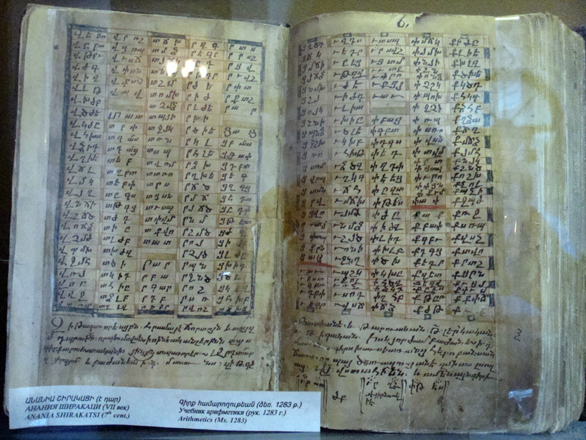 Страница из рукописи труда Анании Ширакаци